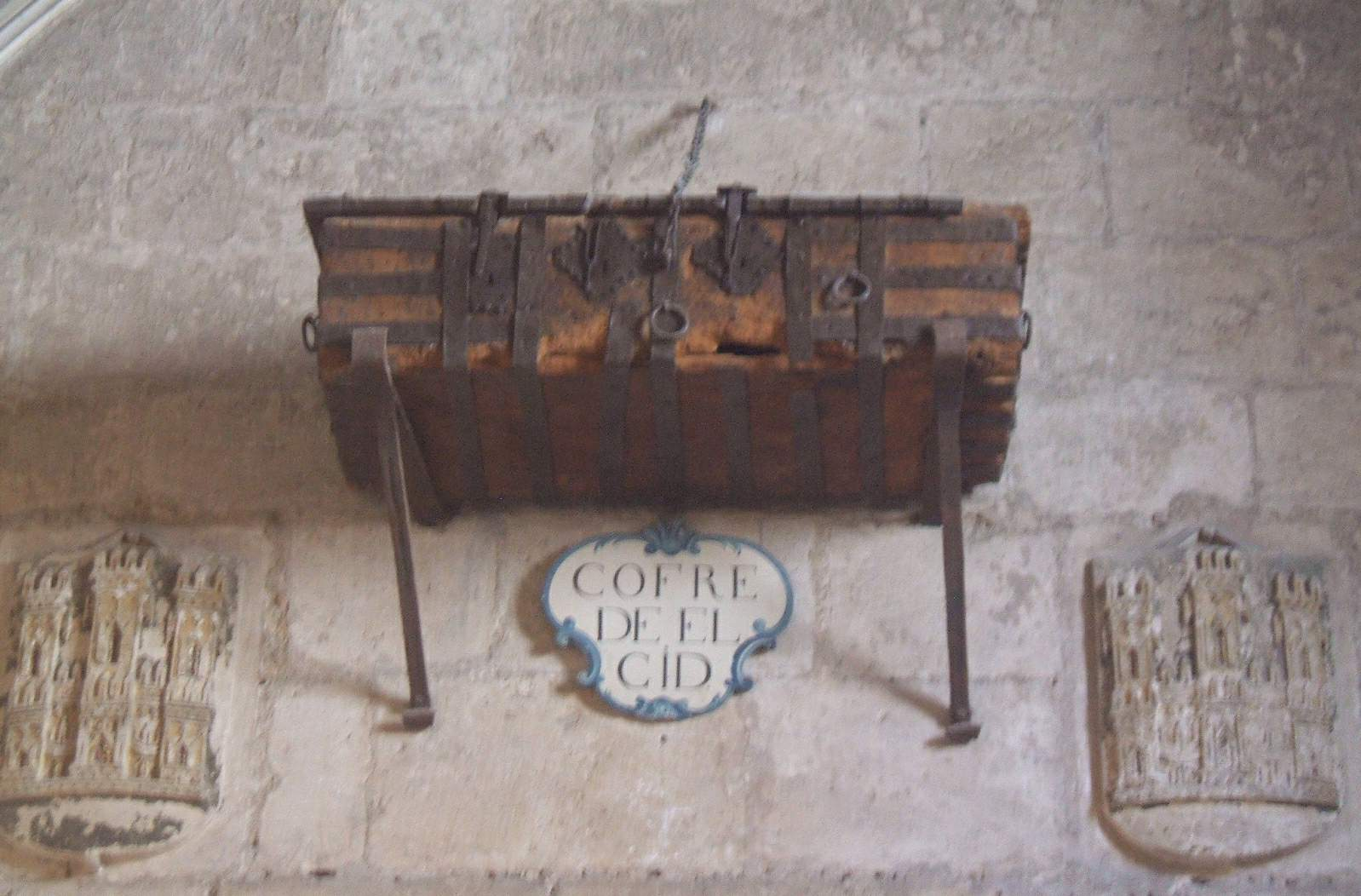 Catedral de Burgos - Capillla del Corpus Christi, Cofre del Cid